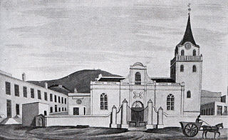 ’n Wit en swart afdruk van ’n skildery deur TF Cromfield van die Groote Kerk en ou slawehuis in 1824